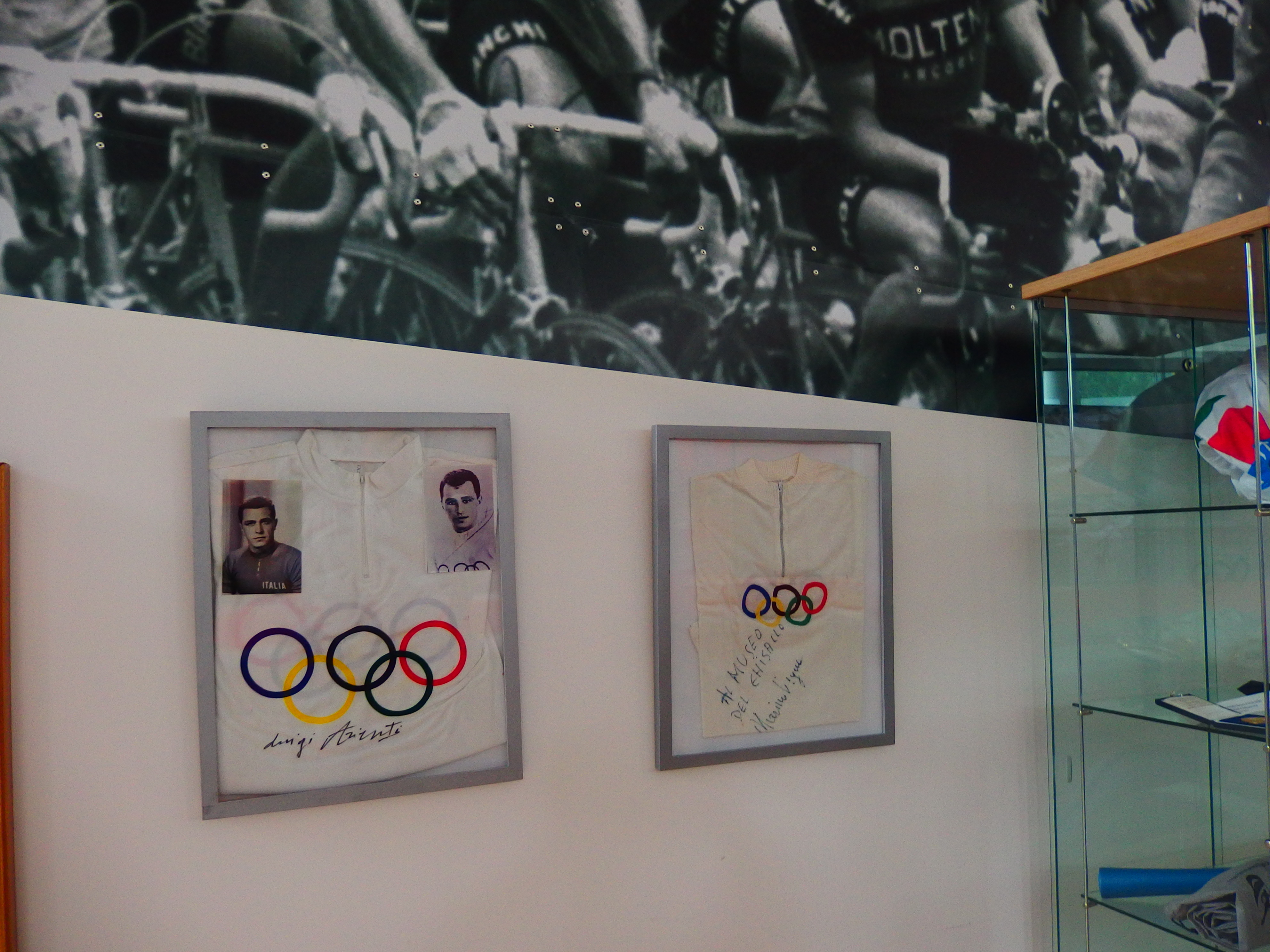 Museo del Ciclismo Madonna del Ghisallo in Magreglio